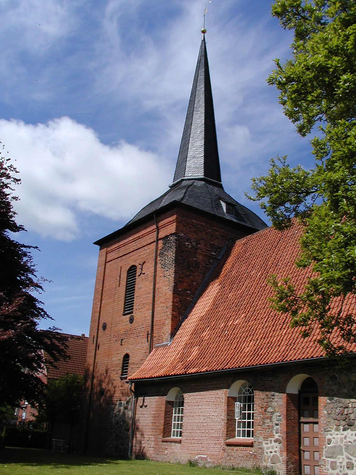 Kirchturm von Oste gesehen